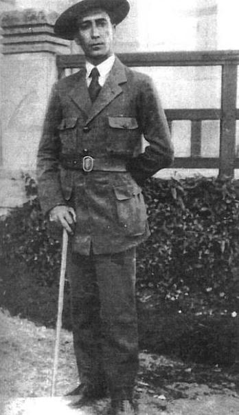 Imagen de la revista El Explorador de Luis López-Dóriga (c. 1920)